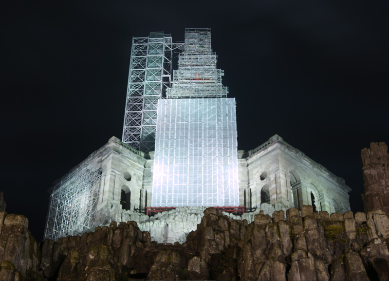 Der Herkules in KAssel ist derzit verhüllt zur Restauration